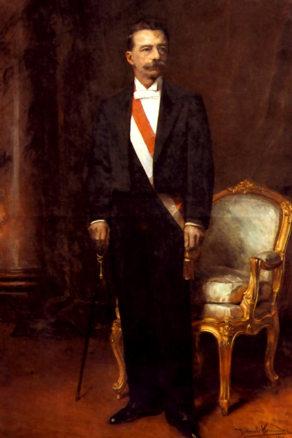 Eduardo López de la Romaña y Alvizuri (1847 - 1912). Presidente del Perú de 1899 a 1903.